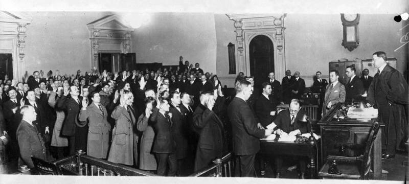 Am Anfang eines jeden Jahres wir ein bestimmter Prozentsatz nach Amerika Eingewanderter zu Staatsbürgern erhoben und vereidigt. Die neuen Staatsbürger bei der Vereidigung im Grossen Saal des Justizgebäudes in New York. Rechts im Bilde der Vereidigungsbeamte, davor der Tisch mit den Beglaubigungsurkunden, welche den neuen Bürgern nach Ihrer Vereidigung überreicht werden.